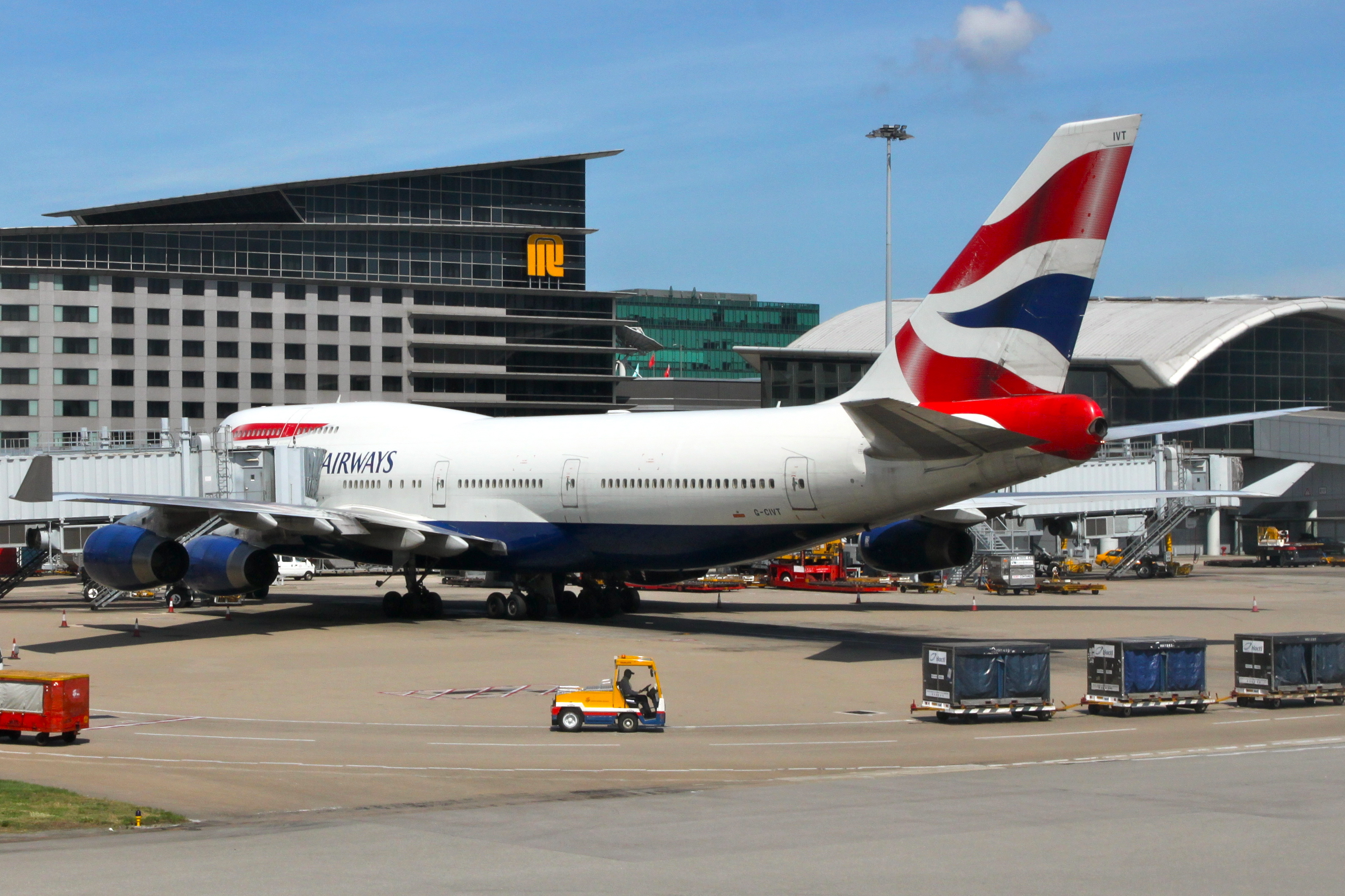 G-CIVT